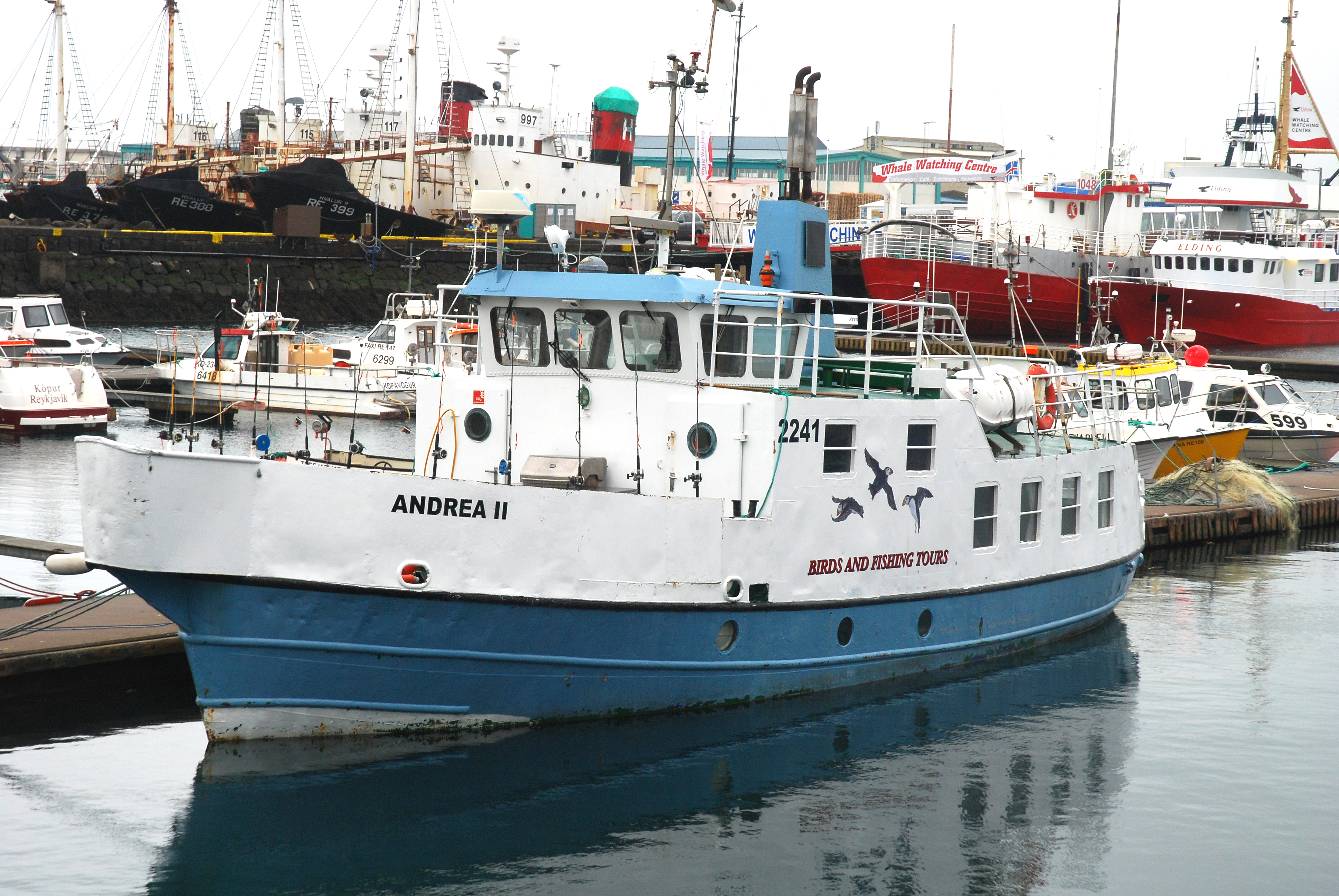 Fiskerbåd i havnen i Reykjavik, Island